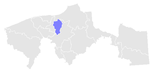 Nacajuca, Tabasco. Hecho con Microsoft Paint